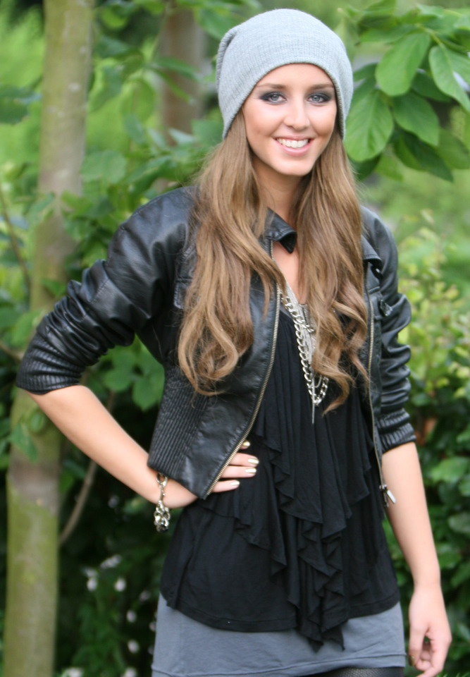 Esmée Denters bij Awards